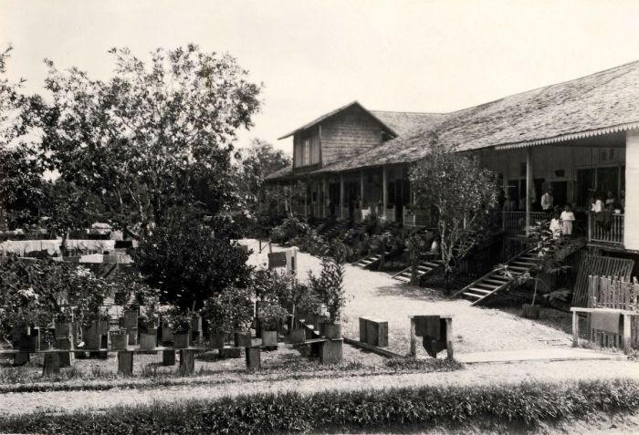 negatief. Chinese Pasar te Poetoes Sibau